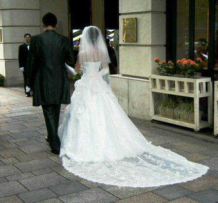 Weddingring